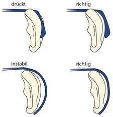 Anpassung von Kinderbrillen